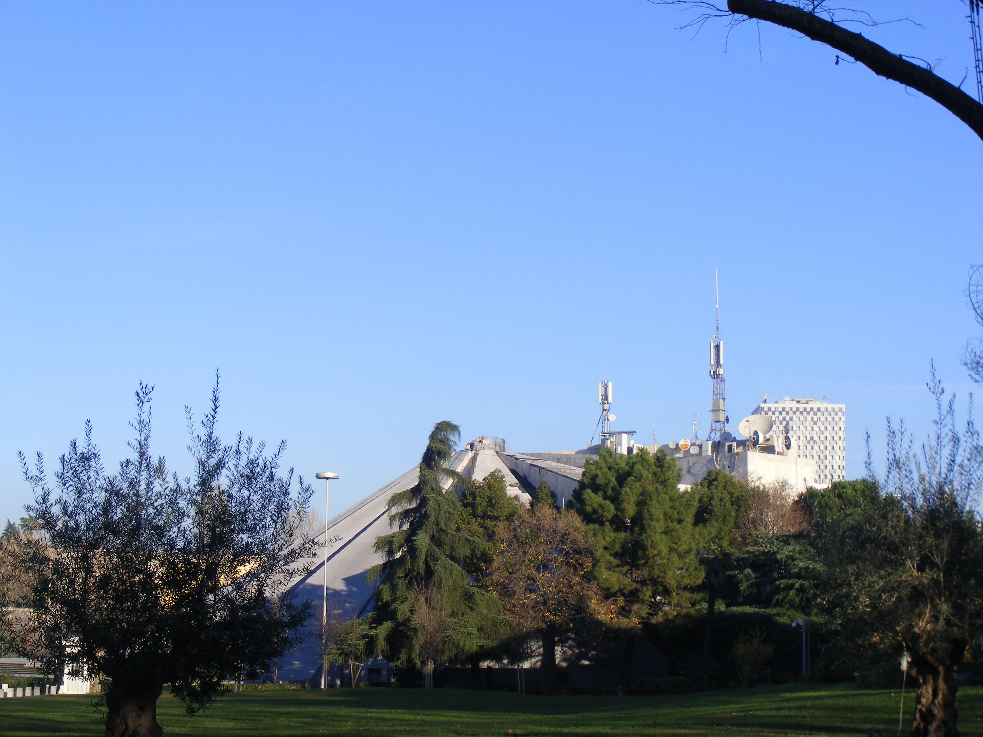 Piramida, Tiranë.